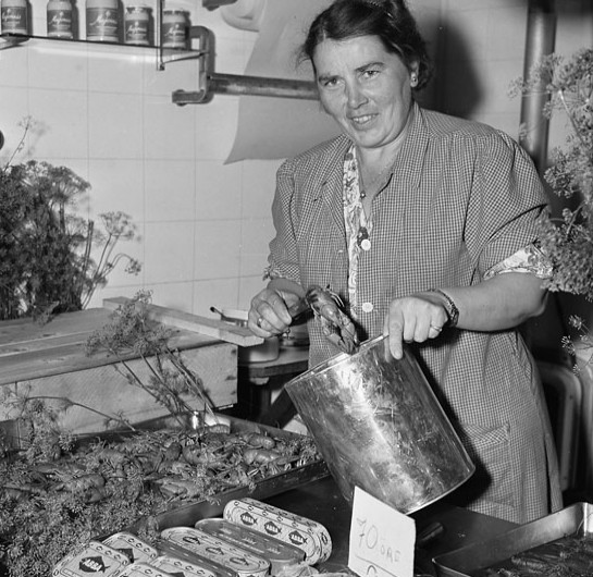 Kvinna säljer kräftor inför kräftpremiären